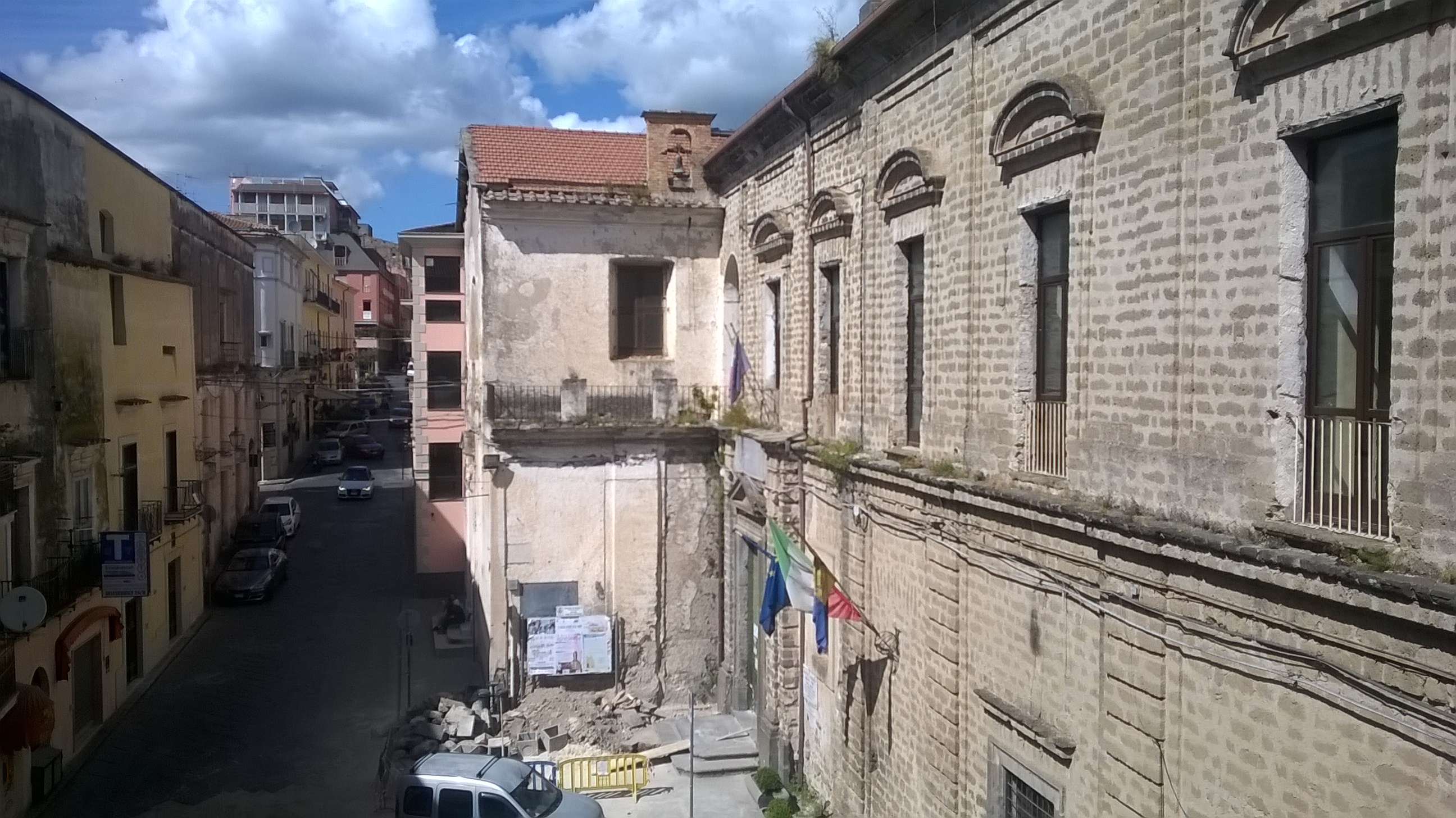 Facciata del "Nifo", visuale dalla biblioteca